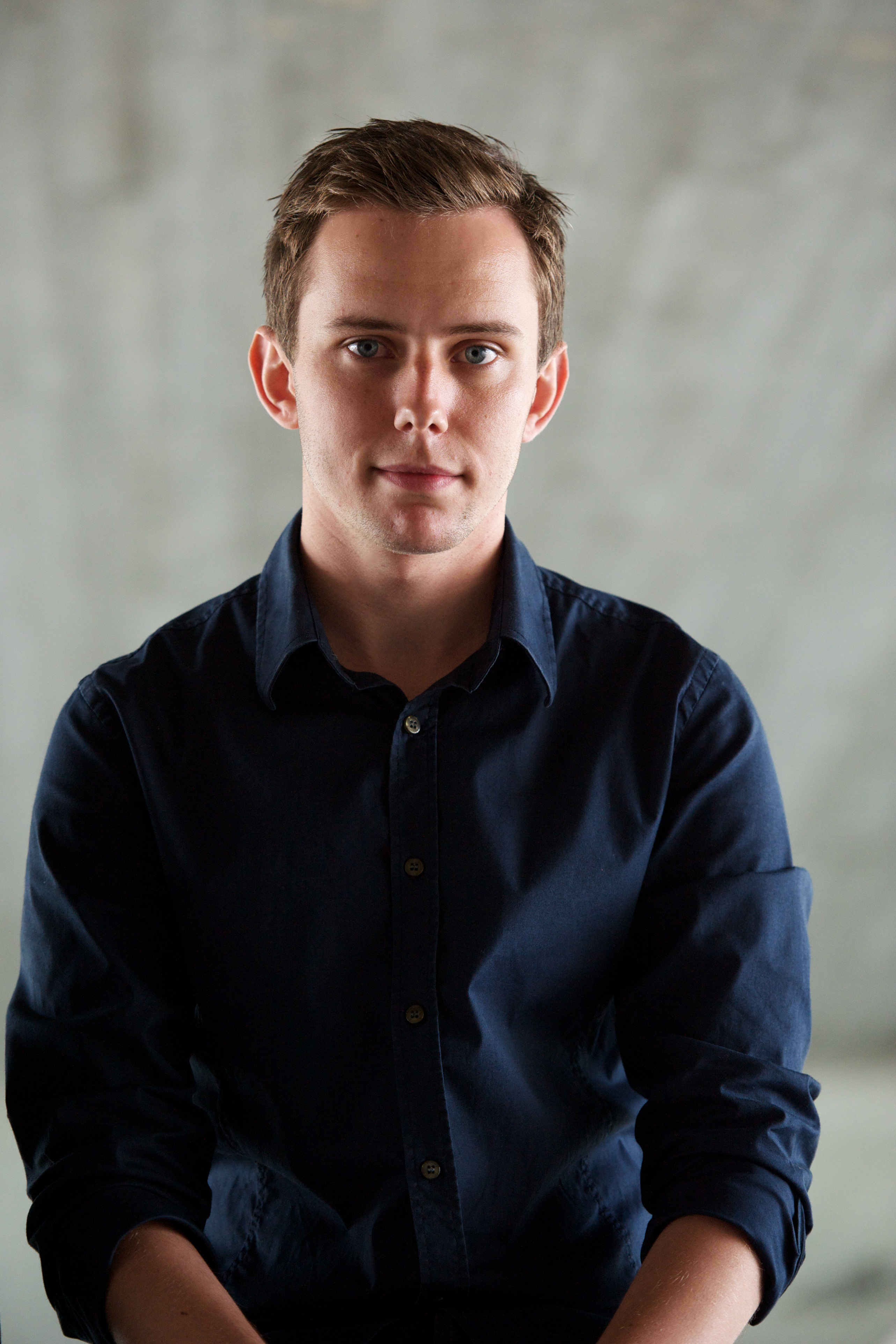 Jens Husted, landsnæstformand for Venstres Ungdom. Fotografen har overdraget ophavsretten til mig.